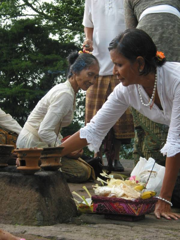 Candi Sukuh